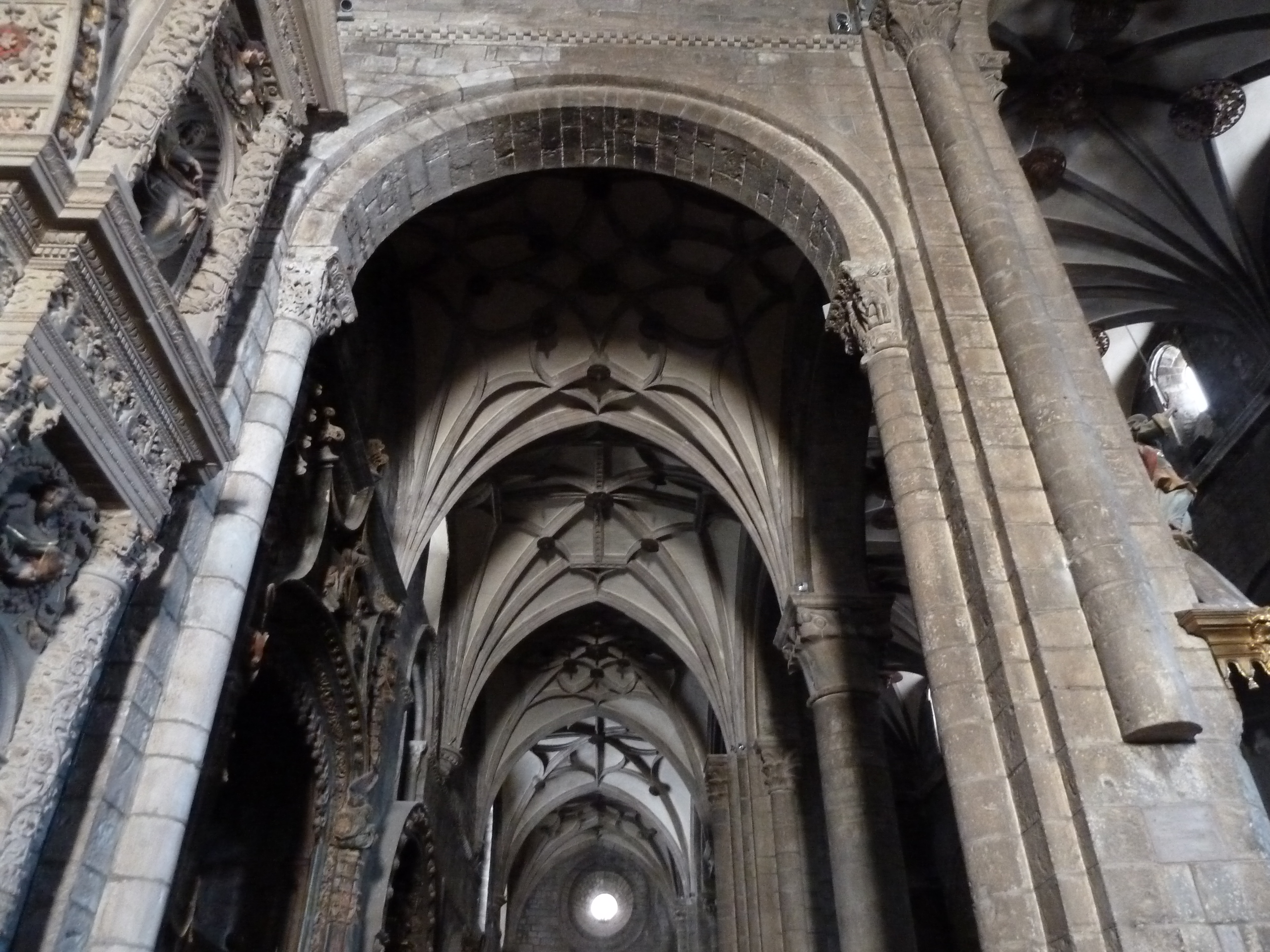 Nave de la Epístola.